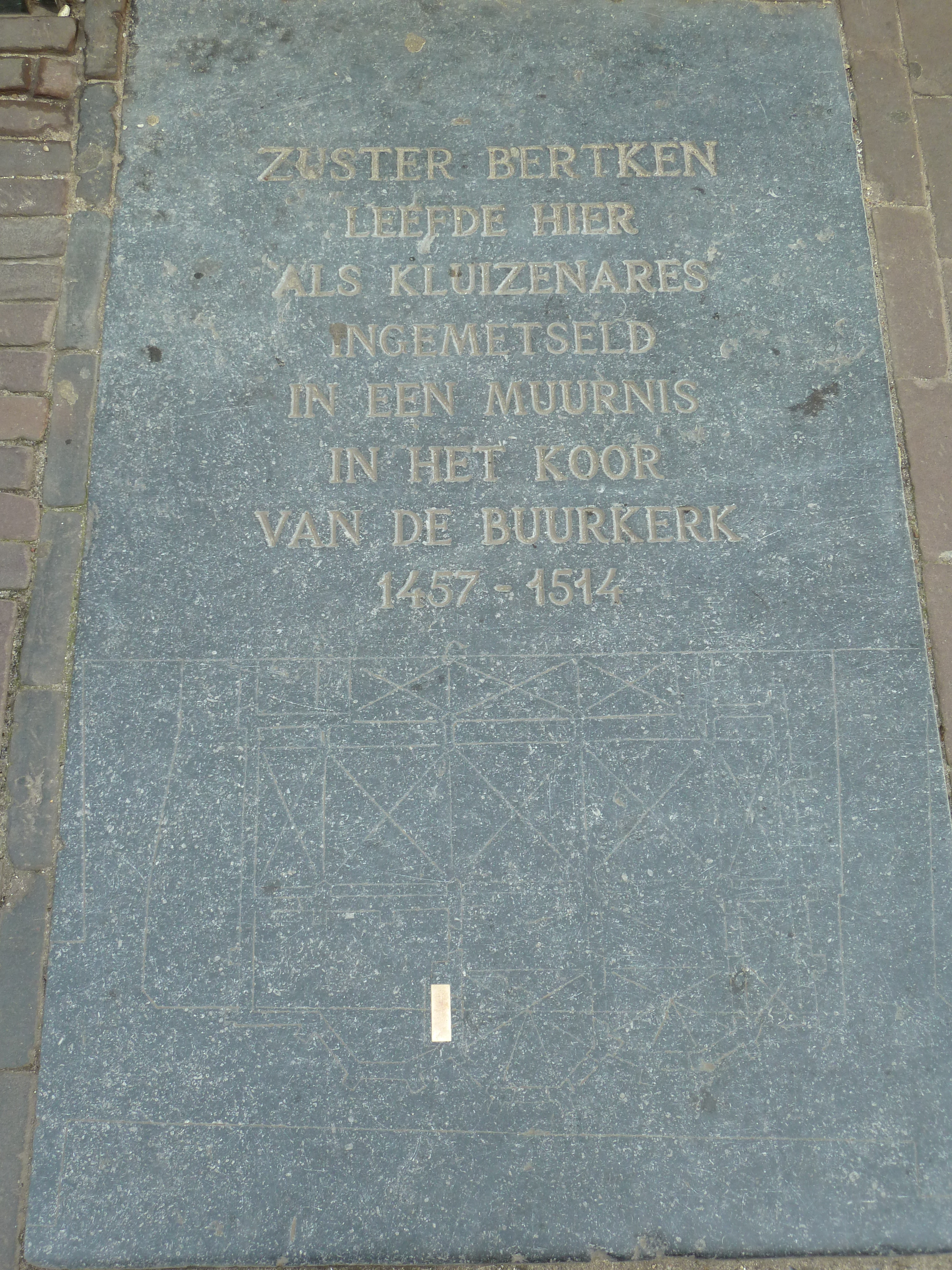 Gedenksteen voor Zuster Bertken met plattegrond van gesloopt deel van kerk. Choorstraat, Utrecht, NL.